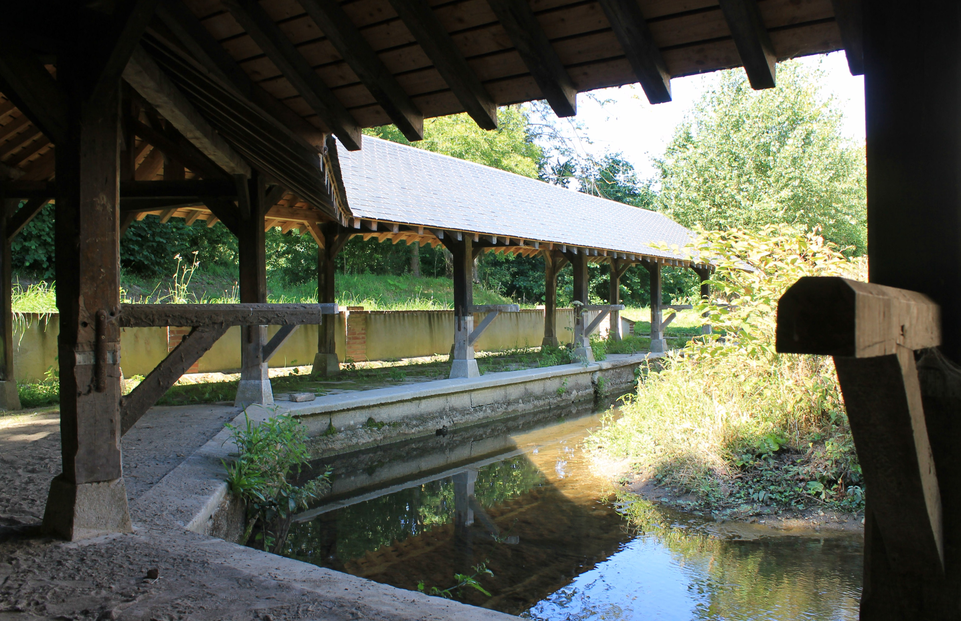 Lavoir du Faubourg des Coupérées sur le ruisseau La Couperée construit en 1822 à Dozulé (Calvados)